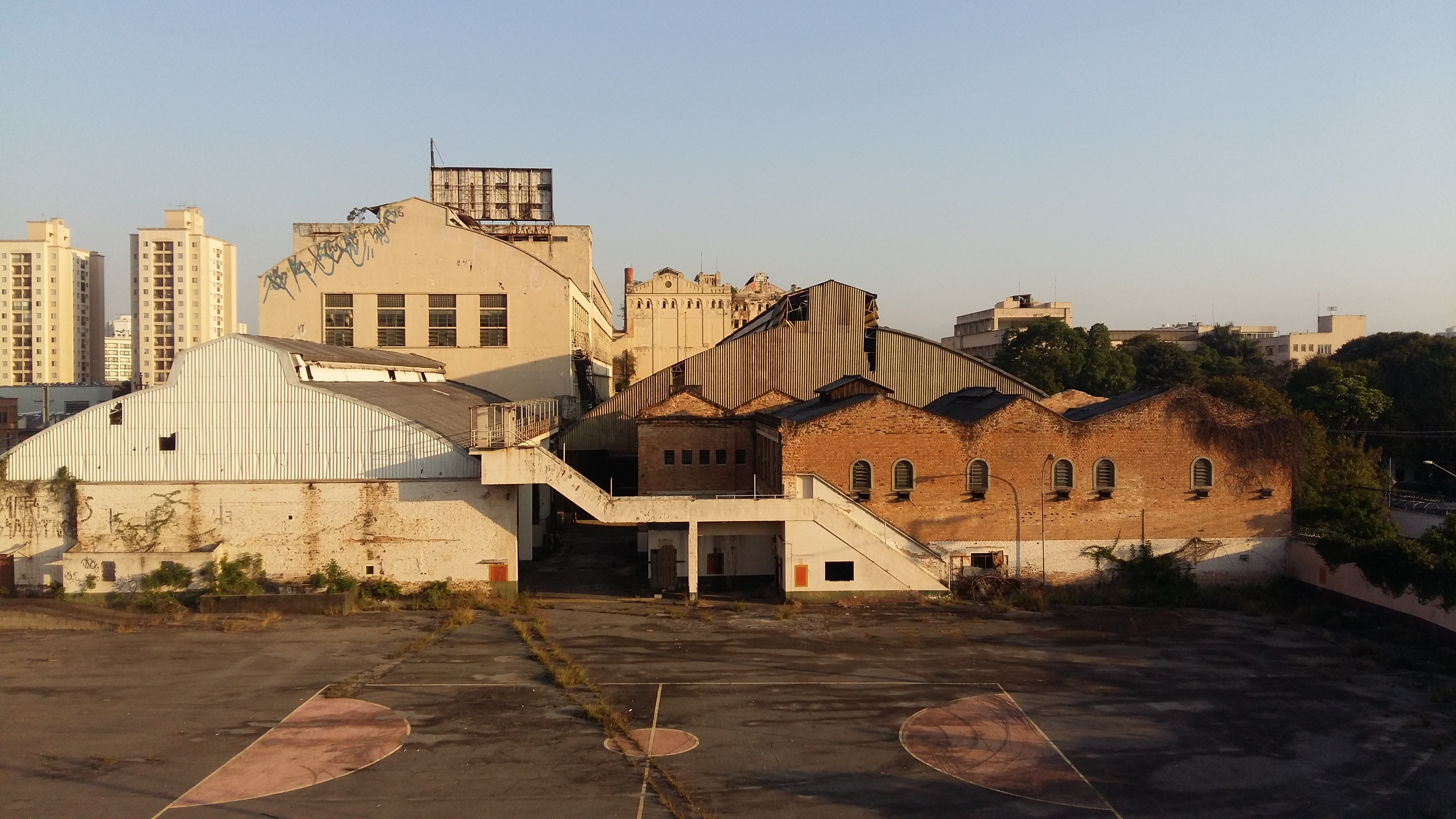 Armazéns externos em torno dos da Antiga São Paulo Railway, na Mooca em São Paulo - SP